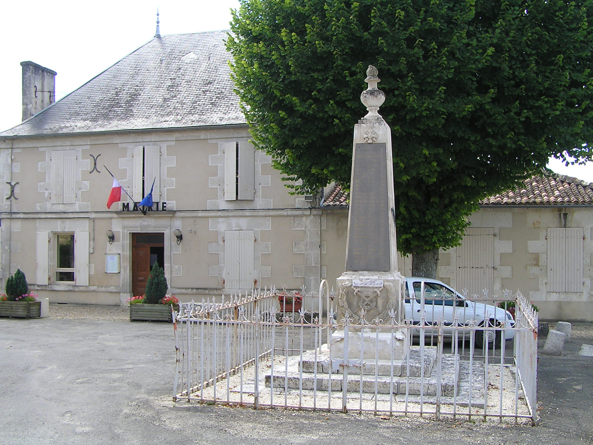 mairie de Moulidars